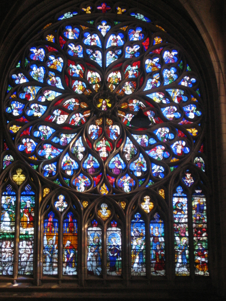 Cathédrale de Sens, Yonne, France : rose du transept